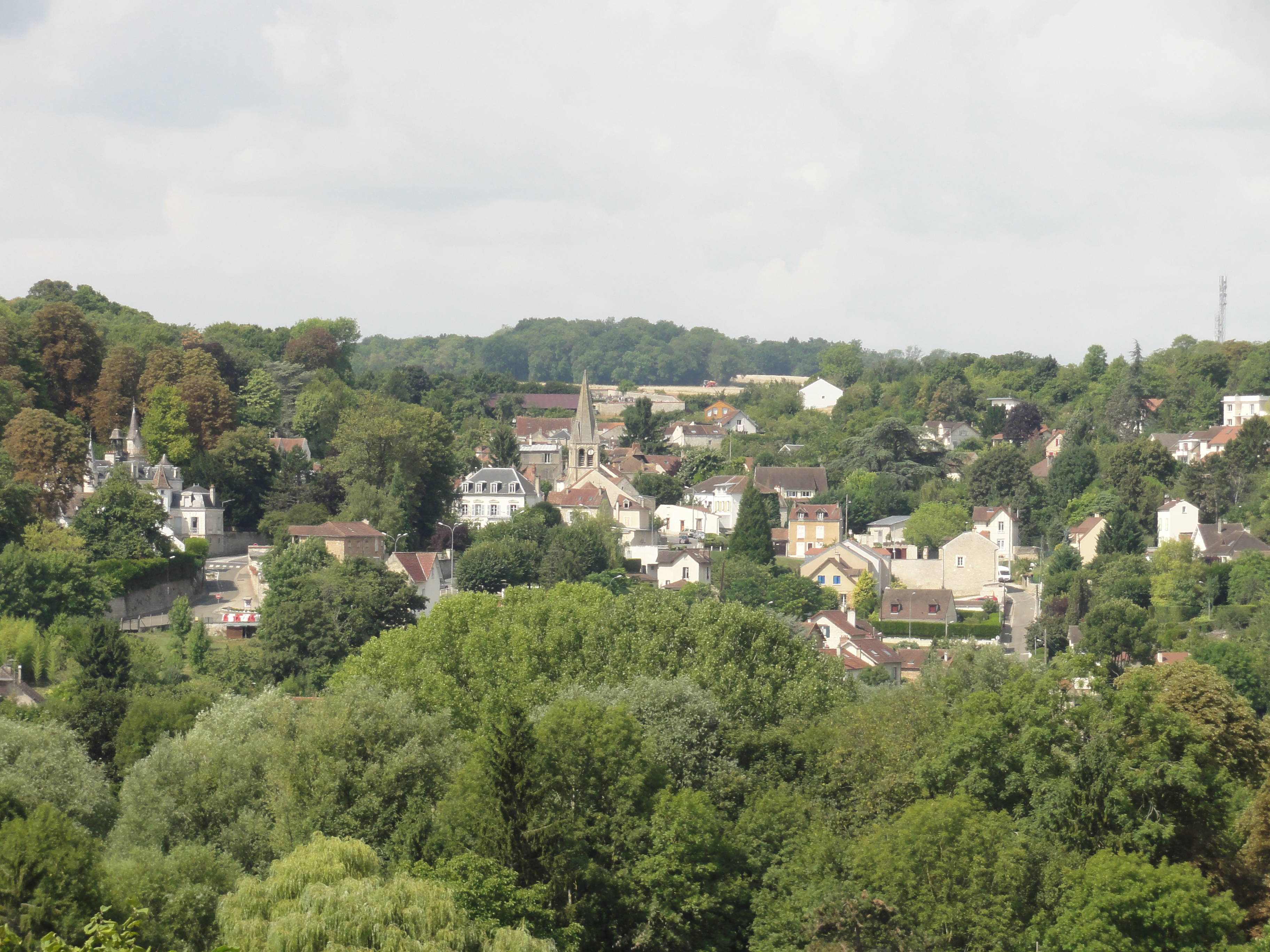 Vue sur Hardricourt et l'église Saint-Germain depuis le jardin du domaine Berson à Meulan.